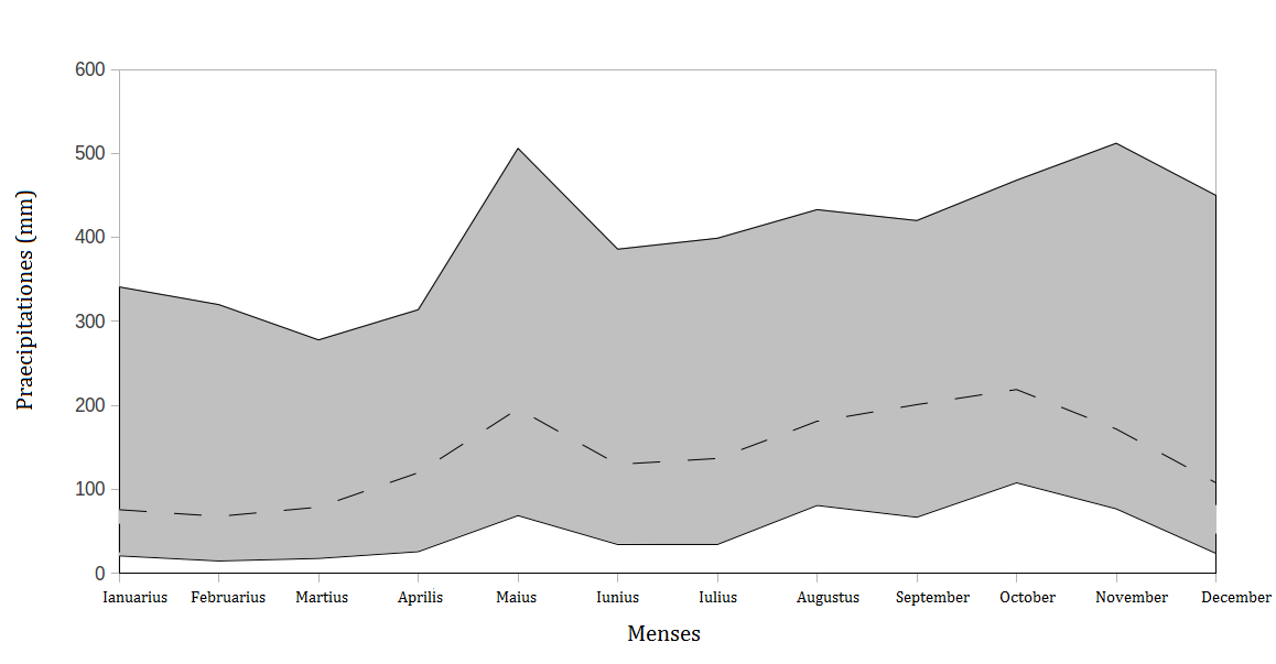 Praecipitationis campus et media ratio (secta linea) in Portorico.